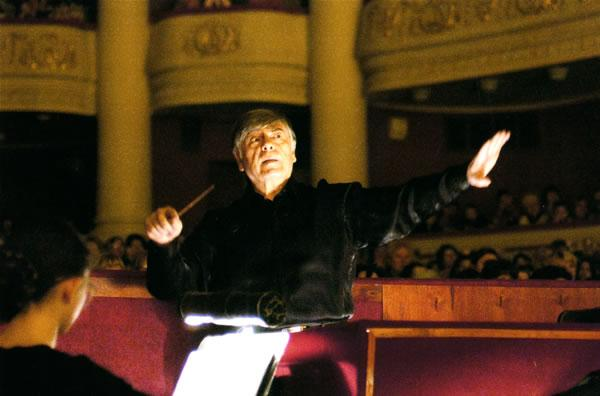 Рук. Симфонического оркестра СОКИ, Заслуженный артист России - Ю.И.Скворцов